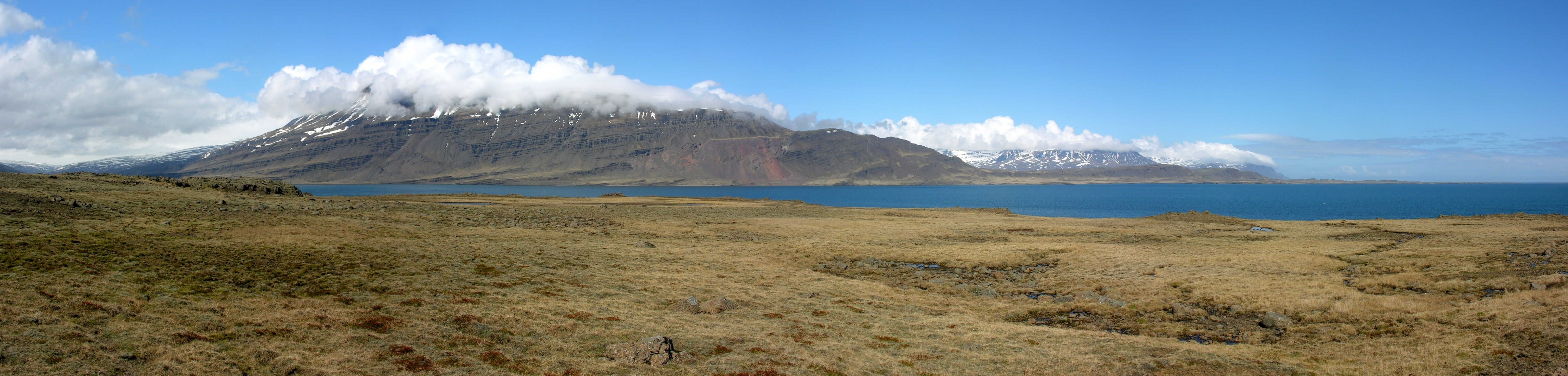 Hamarsfjörður